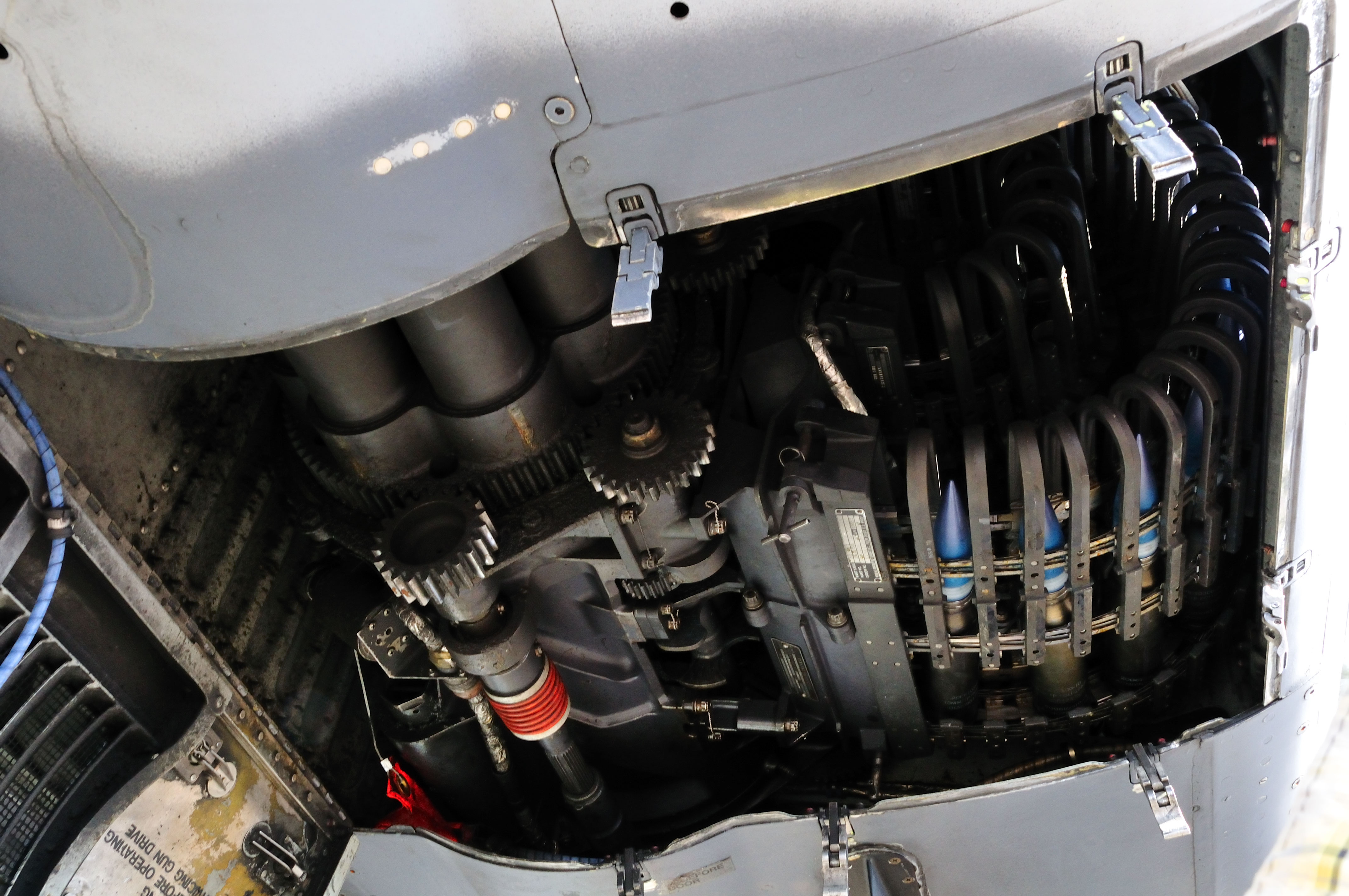 Reno Air Races 2009